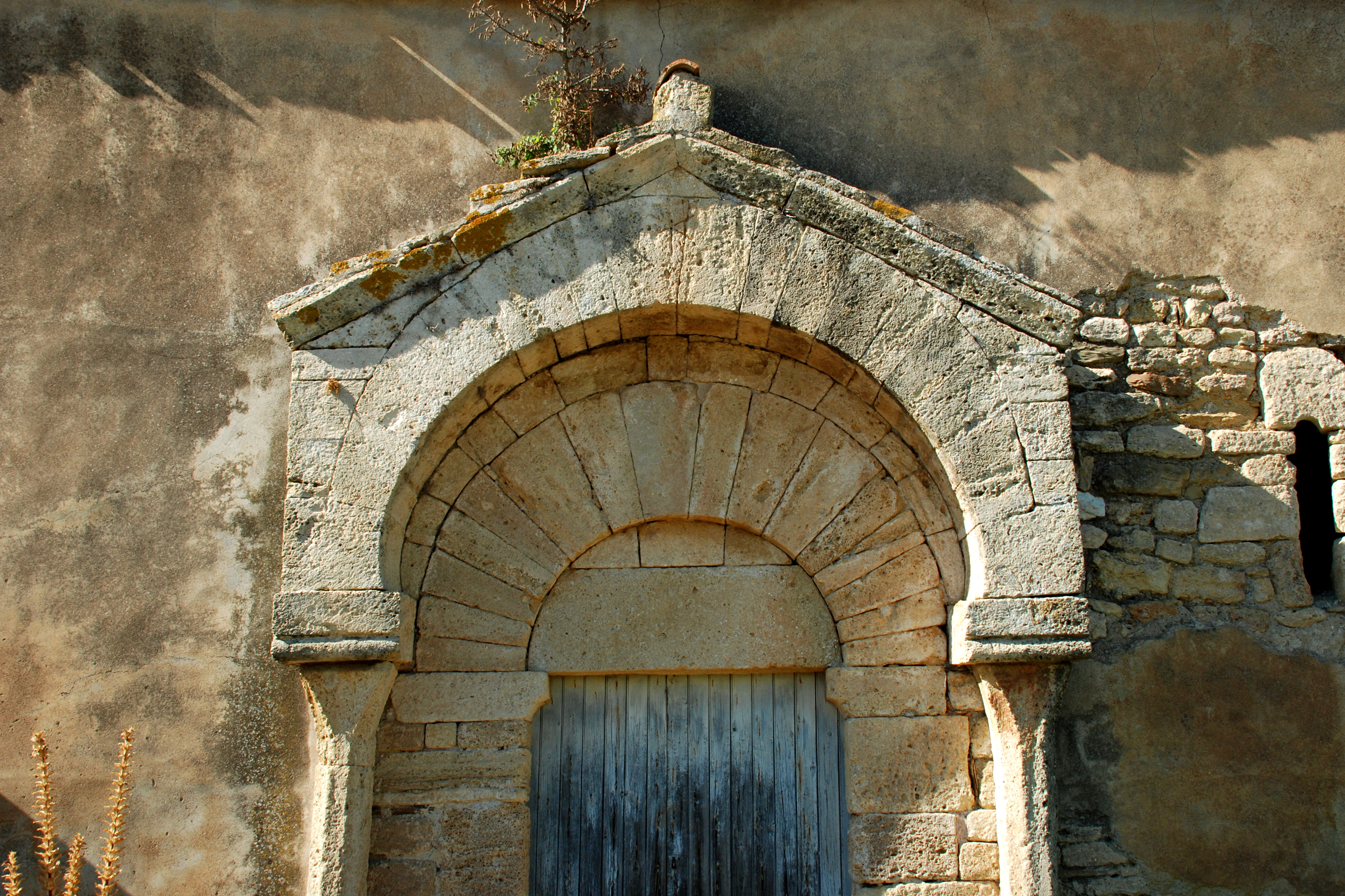 France - Languedoc - Hérault - Roujan - chapelle Saint-Nazaire